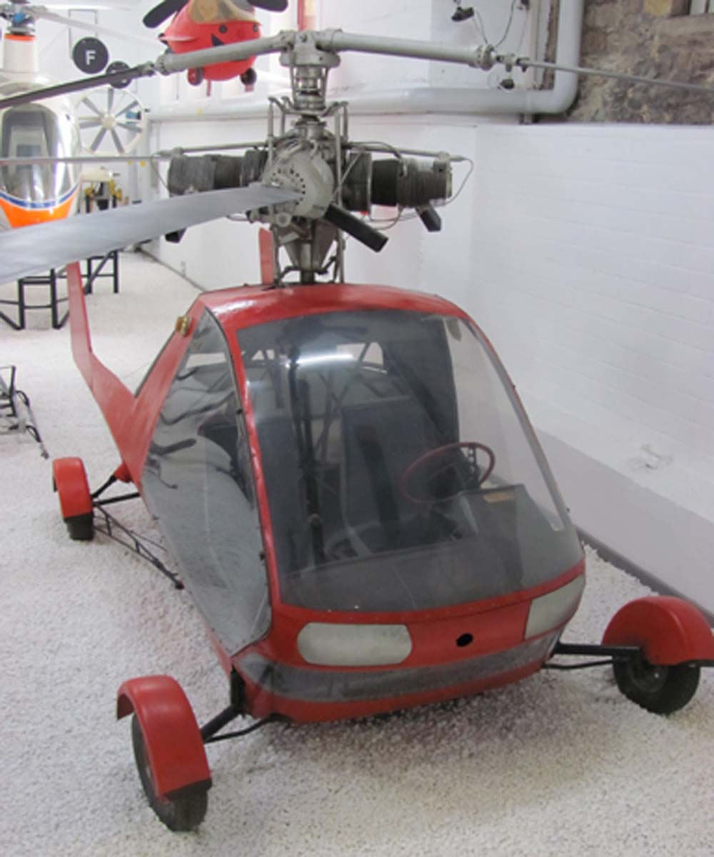 Wagner Rotocar III im Hubschraubermuseum Bueckeburg